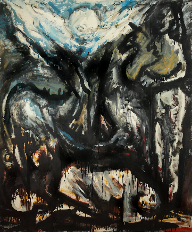 Ulje na platnu "Vučica u zoru" Ante Jerkovića izrađeno je 1987, a fotografirao ga je Boris Cvjetanović 2009 godine.